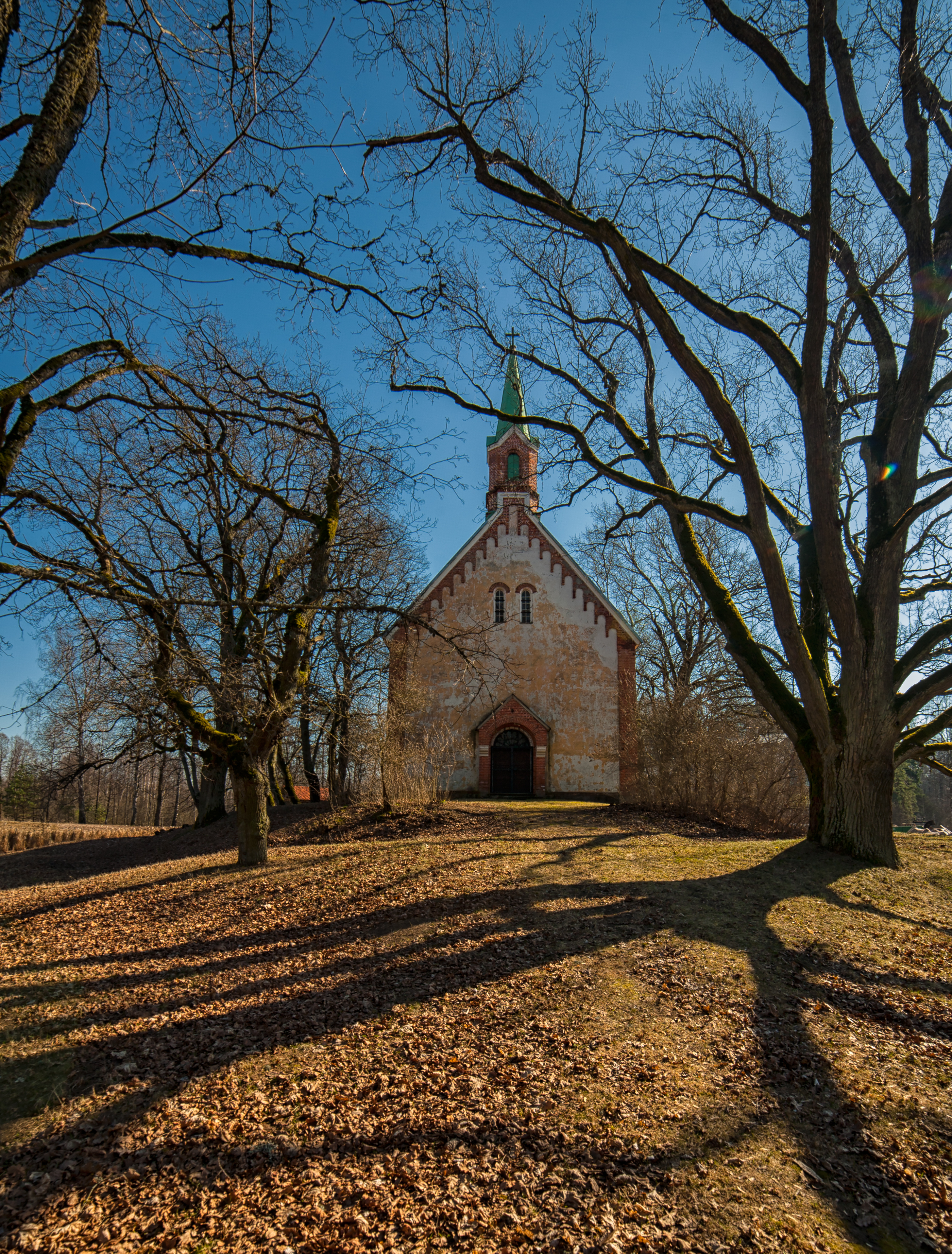 Piņķu Sv. Annas luterāņu baznīca, Babītes pagasts